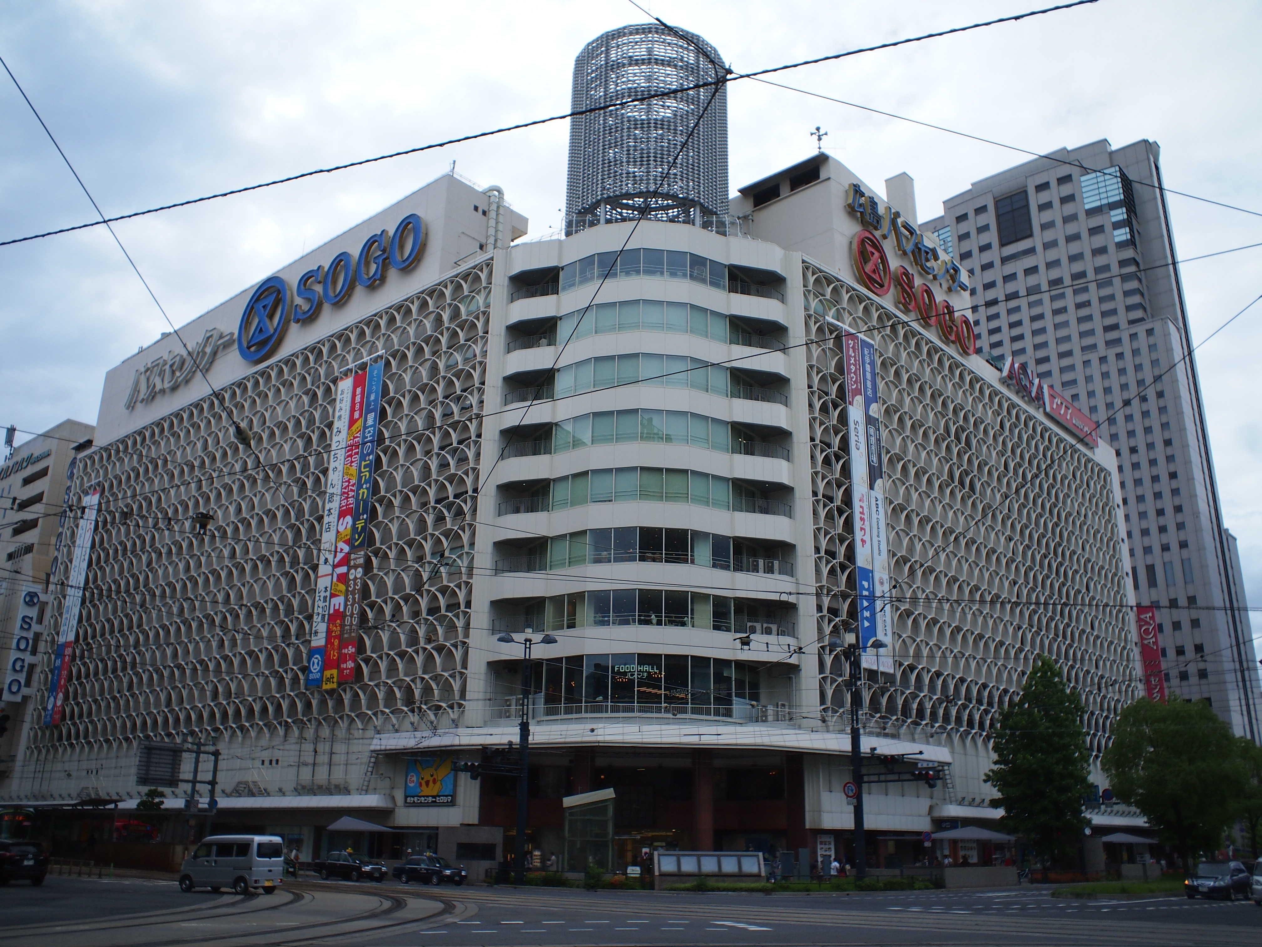 広島そごう